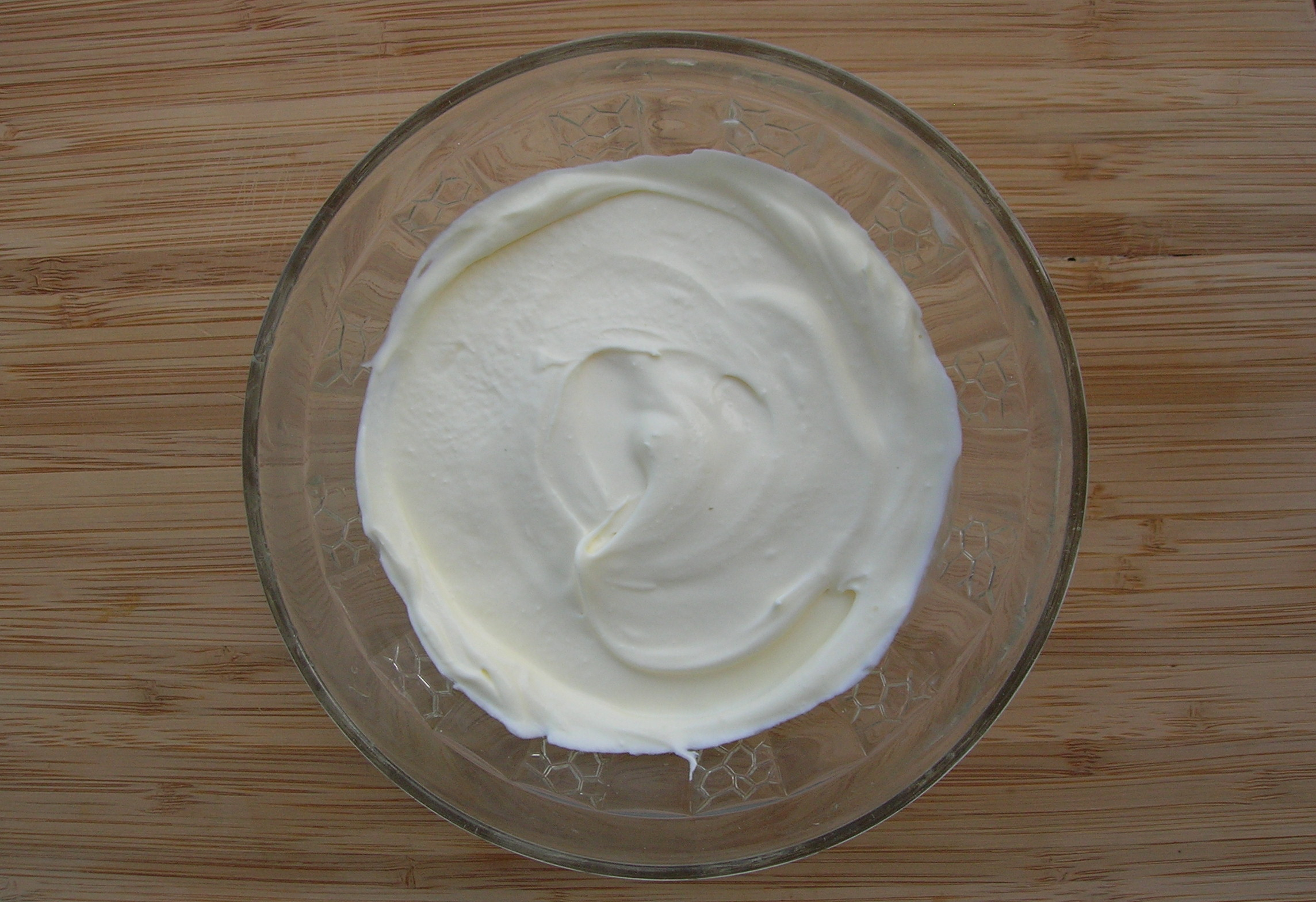 La crème fraîche d'Isigny est un produit AOC français.